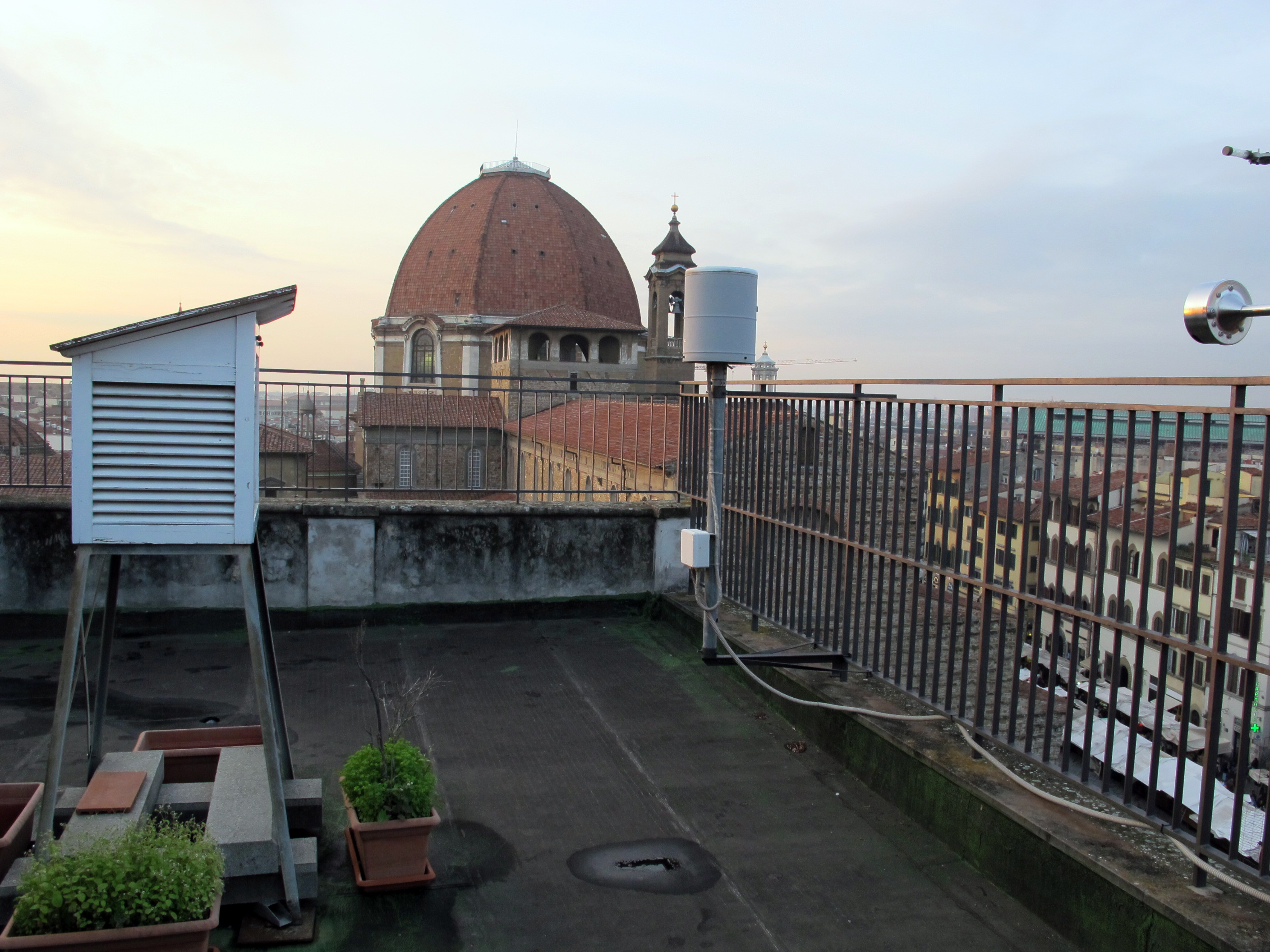 Osservatorio ximeniano, stazione metereologica